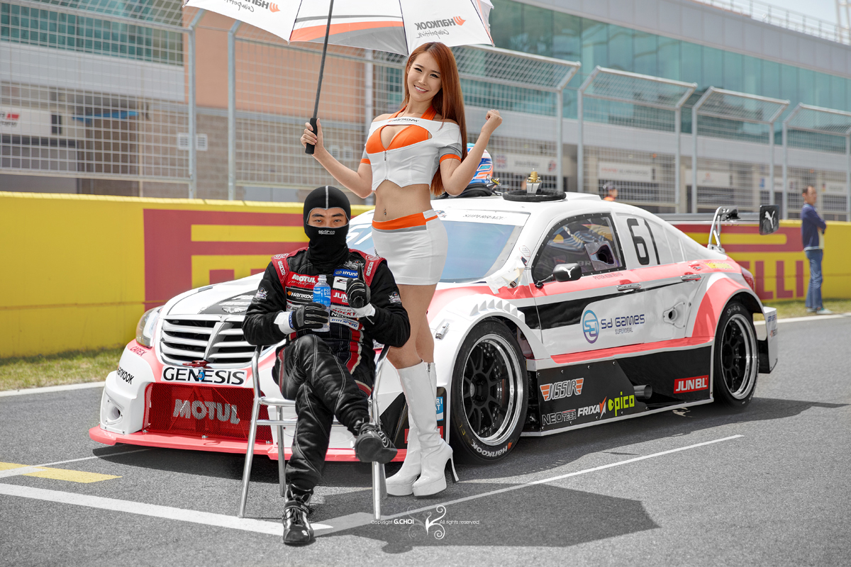 2013 CJ 슈퍼레이스 개막전 이레인레이싱팀 드라이버 피터김, 레이싱모델 이효영